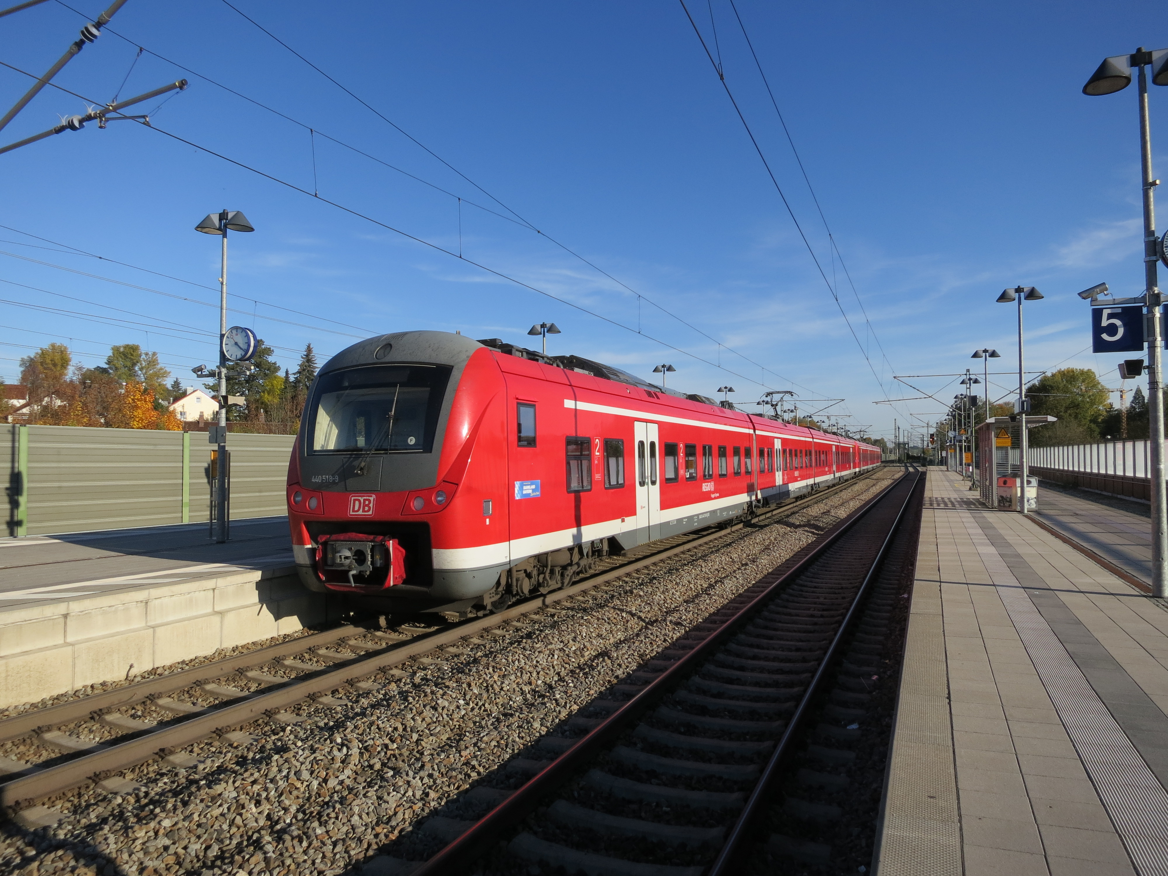 Triebwagen der DB-Baureihe 440 (Alstom Coradia Continental) als RE nach München Hbf im Bahnhof Mering